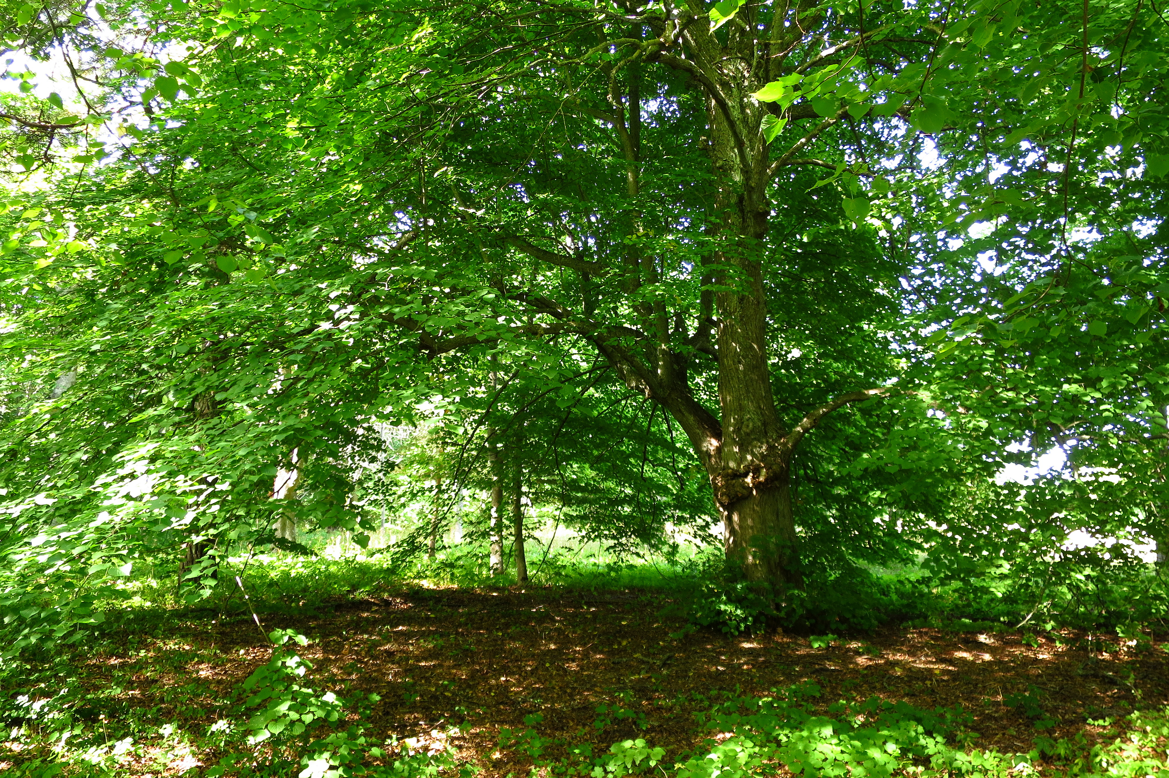 Pärn Mõntu pargis Saaremaal